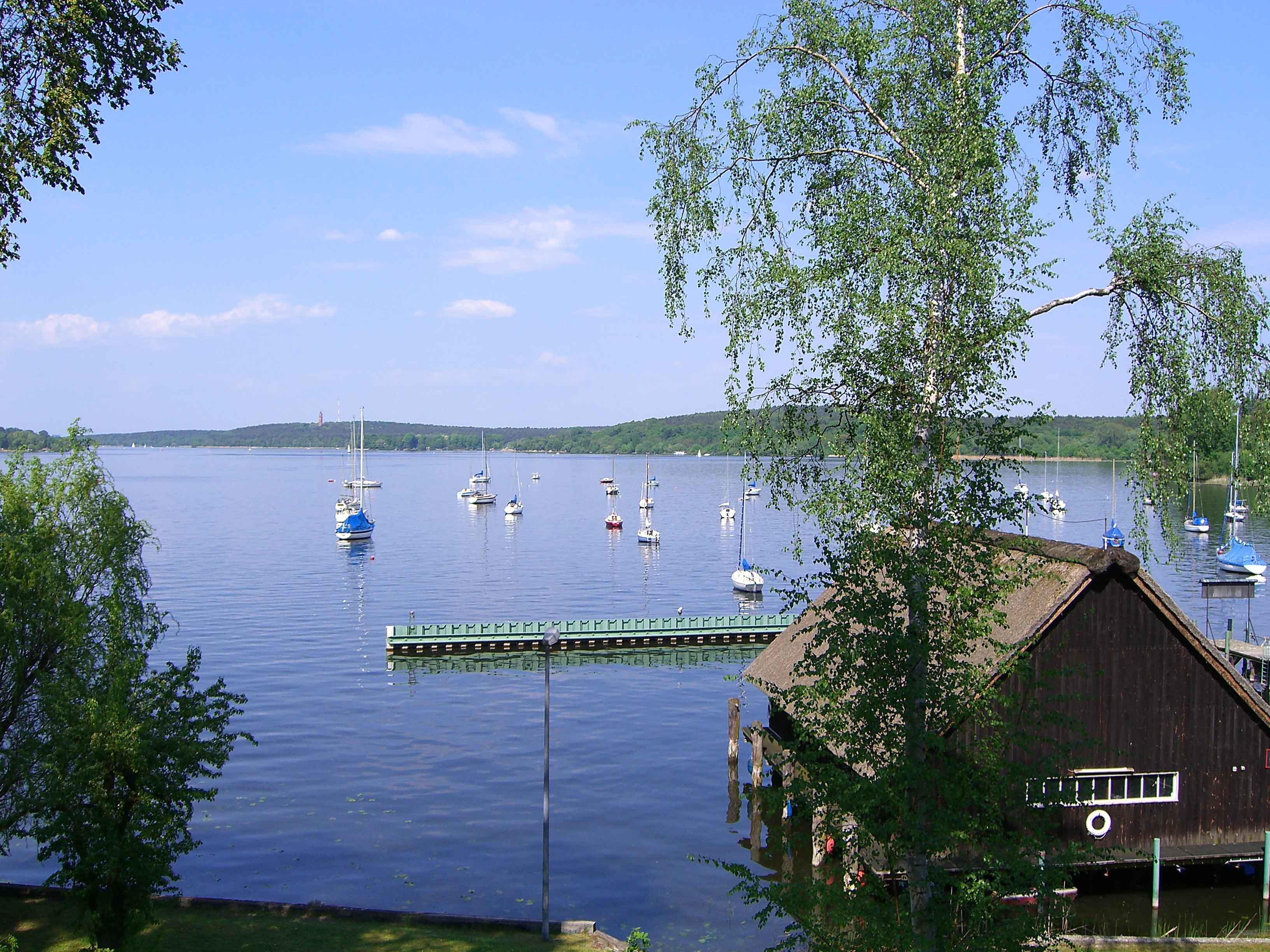 Boathouse on island "Schwanenwerder" at Berlin